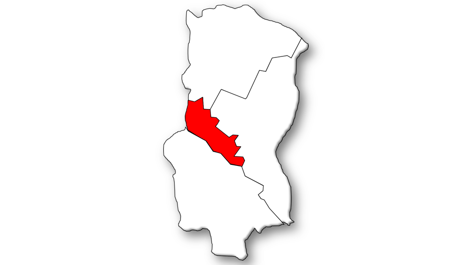 Evolução da População